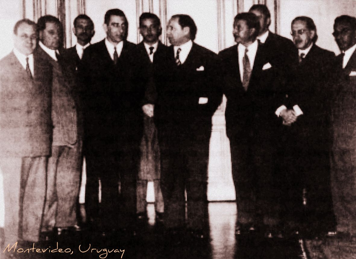 ODCA fue fundada el 23 de abril de 1947, en Montevideo, Uruguay. En el encuentro, fue creada una directiva con la misión de organizar la “sección internacional” del movimiento, integrada por Manuel Ordoñez, de Argentina; Alceu Amoroso Lima, de Brasil; Eduardo Frei Montalva, de Chile; y Dardo Regules, de Uruguay.